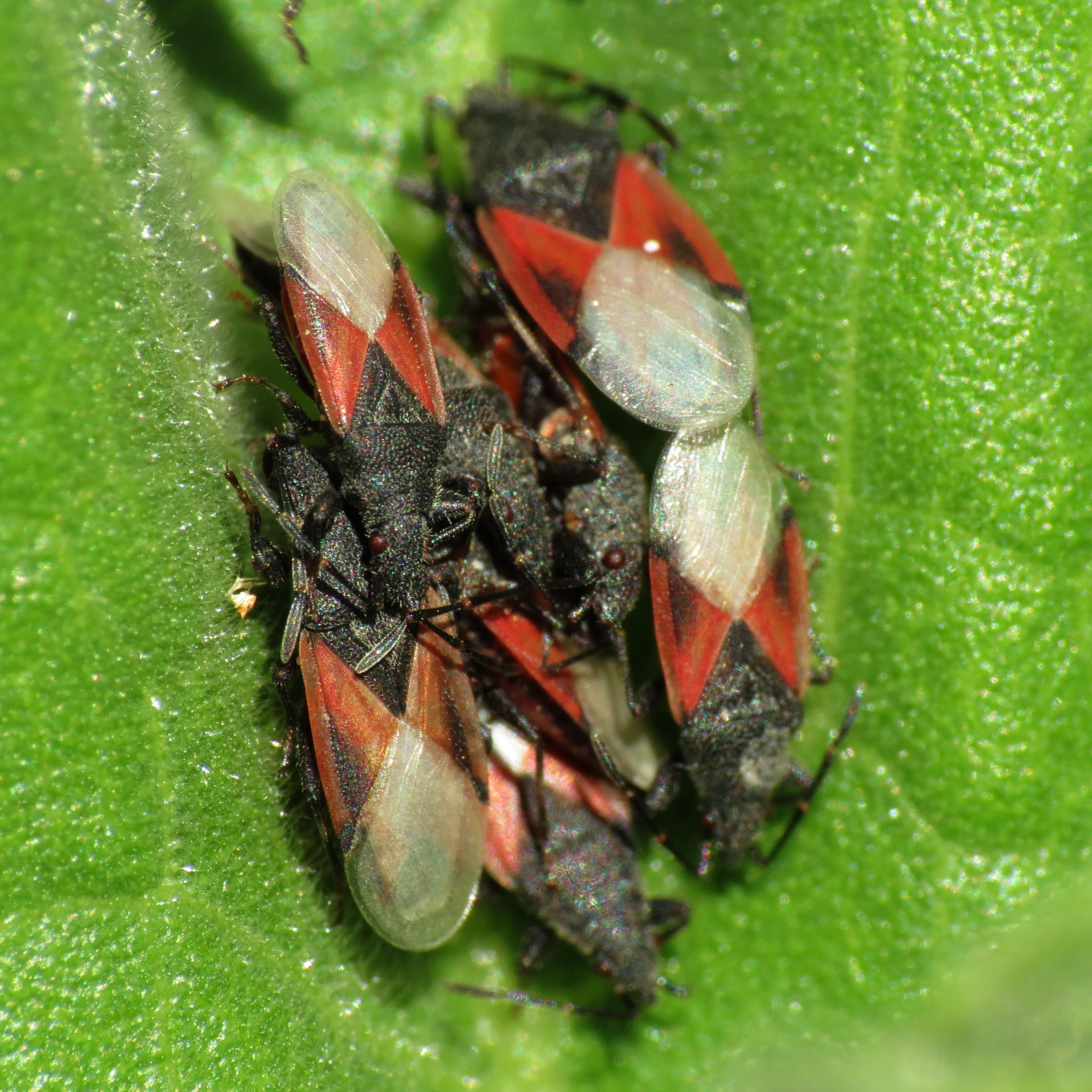 Oxycarenus lavaterae, Els Poblets, Comunidad Valenciana, Spain. 29 December 2012.